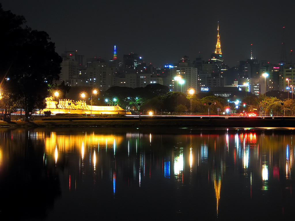 Cidade de São Paulo vista do Parque Ibirapuera